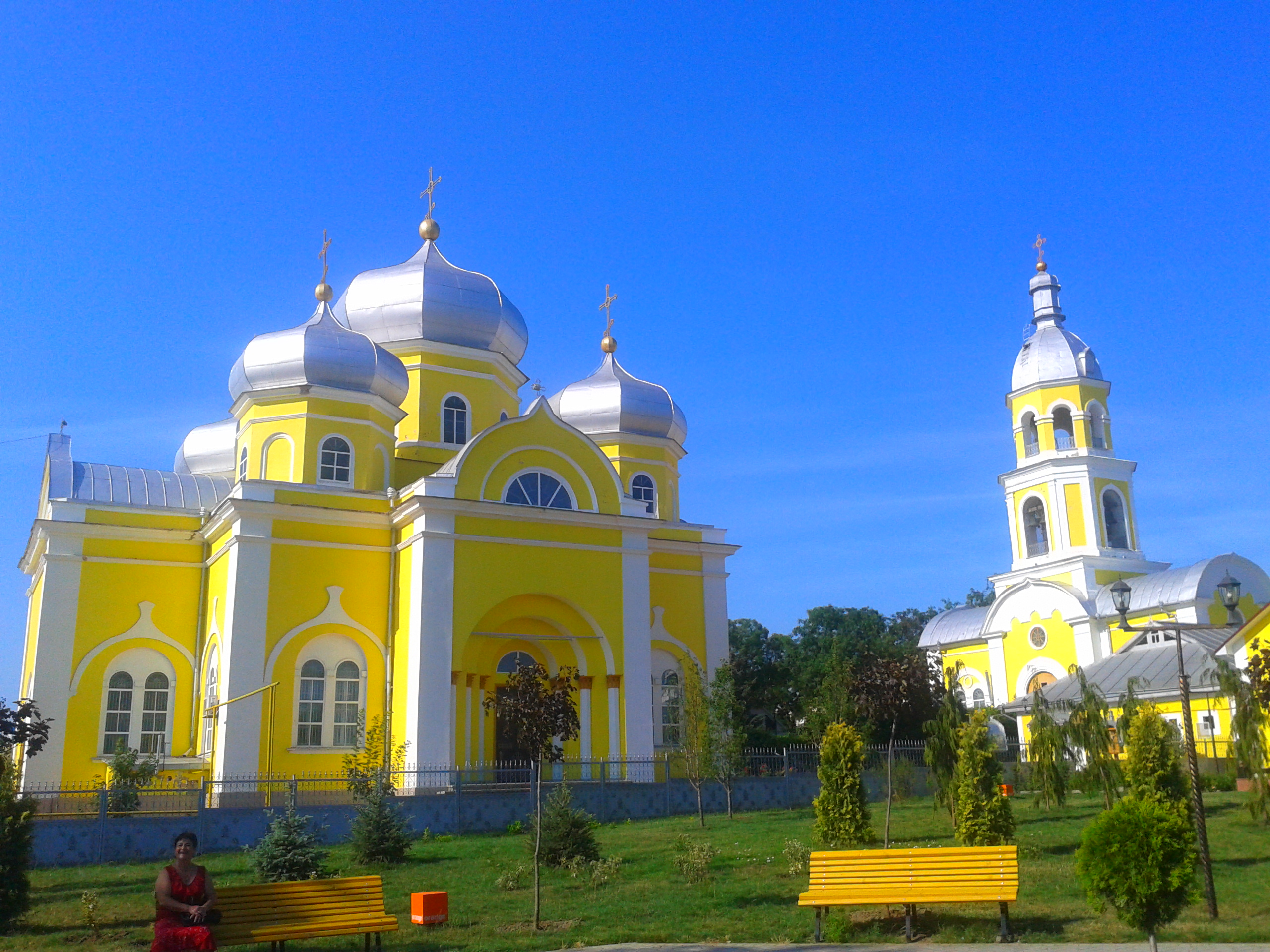 Собор Святого Иоанна